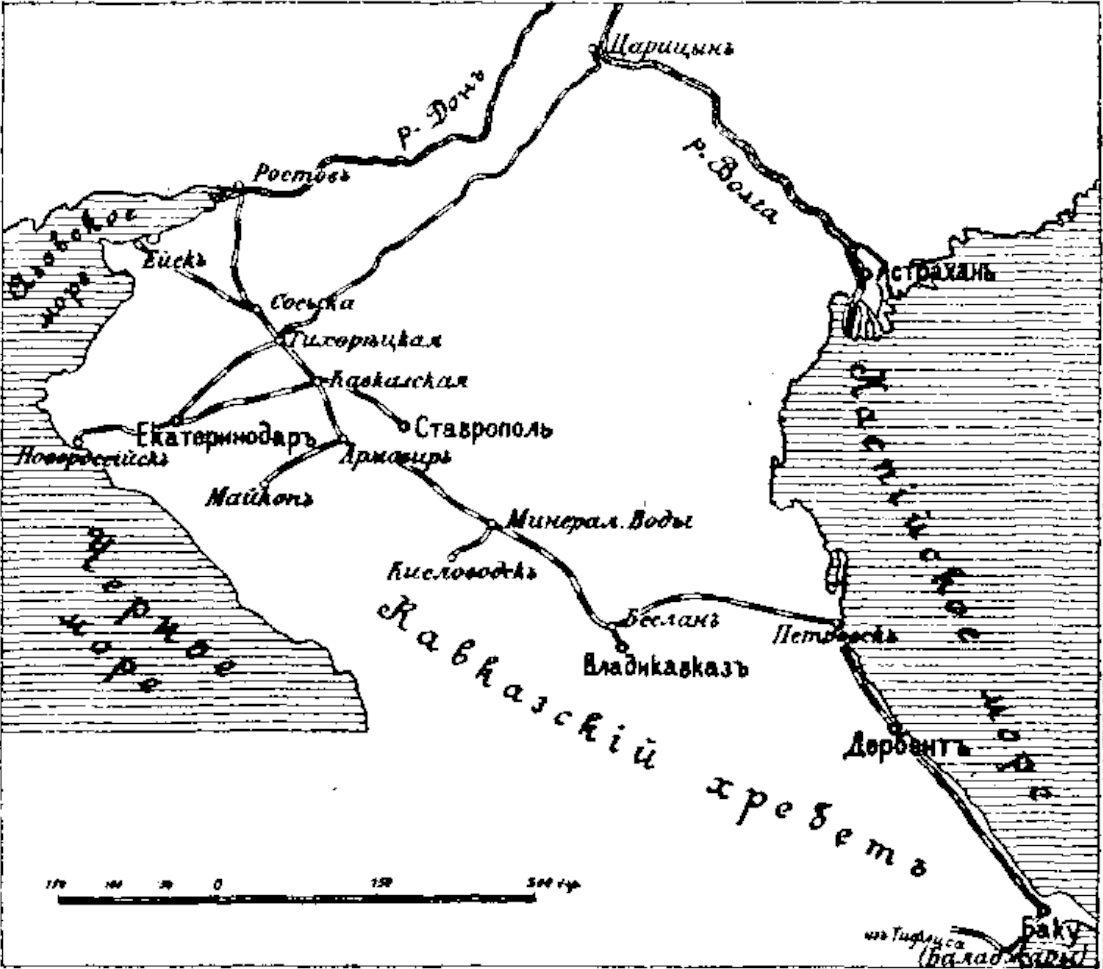 Владикавказская железная дорога 1899 год. Данное изображение было использовано в статье «Владикавказская железная дорога» опубликованной в шестом томе «Военной энциклопедии», который был издан книгоиздательским товариществом Ивана Дмитриевича Сытина в 1912 году в столице Российской империи городе Санкт-Петербурге.